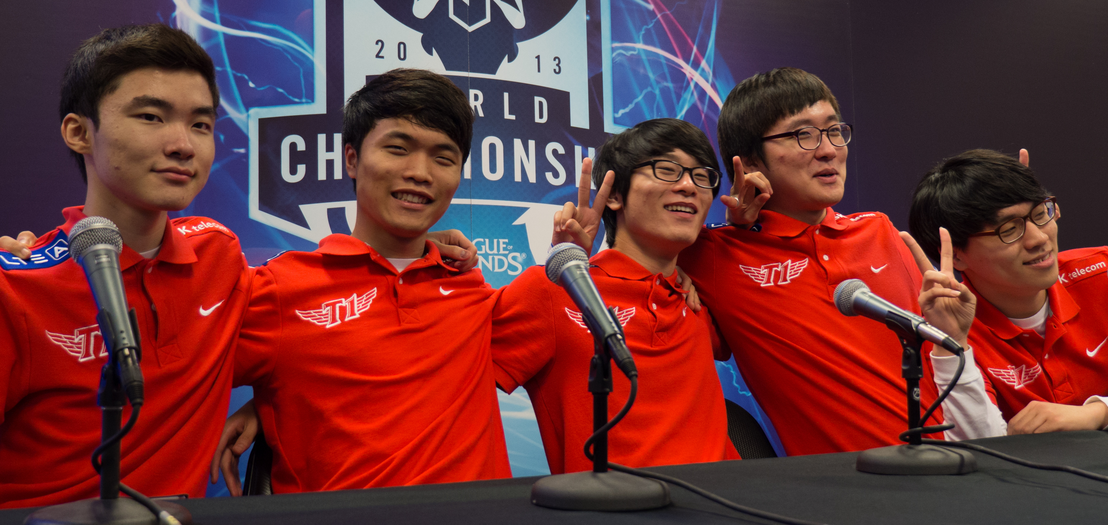 League of Legends Spieler vom Team SK Telecom T1 bei der League of Legends World Championship